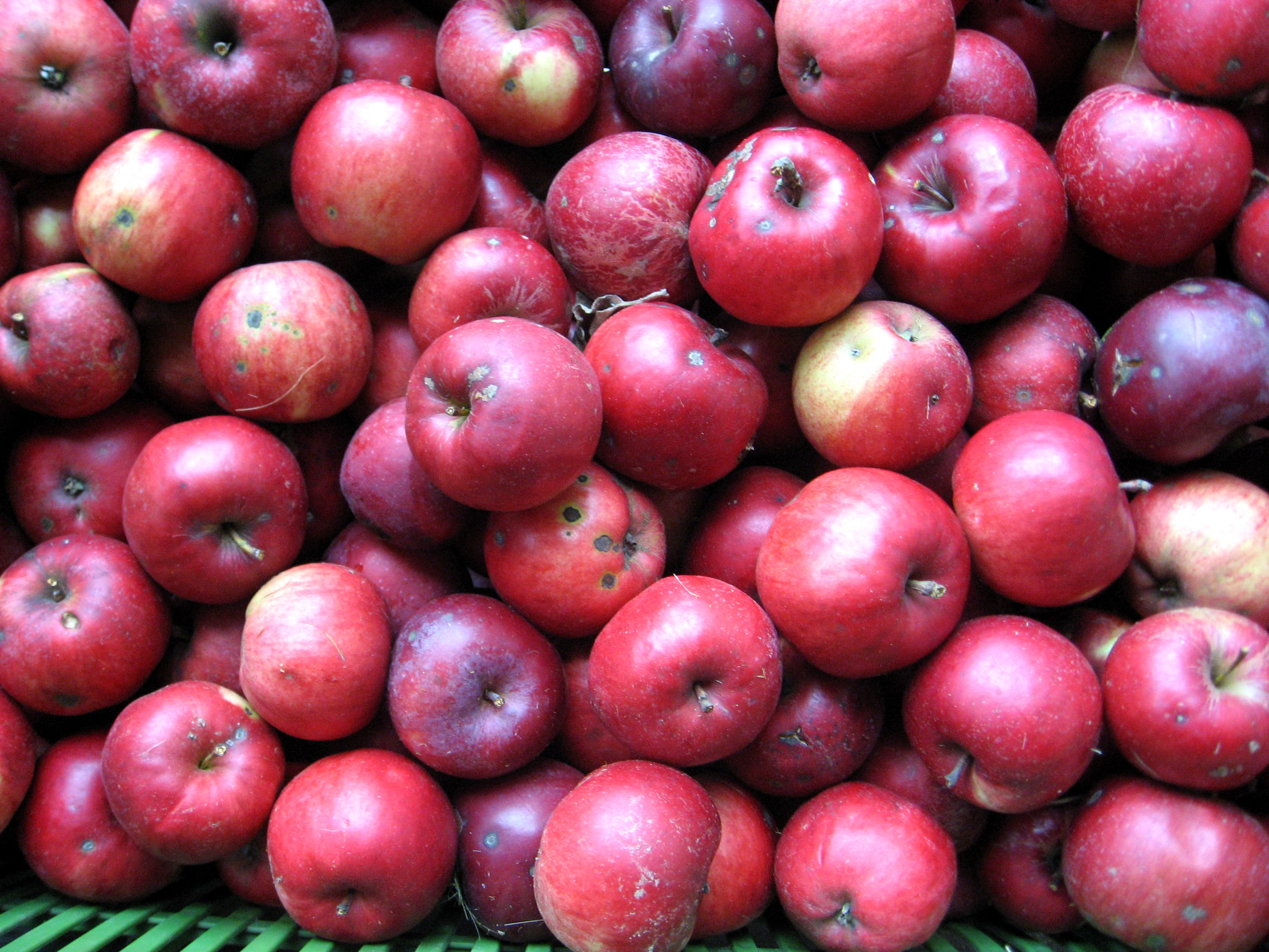 jablka